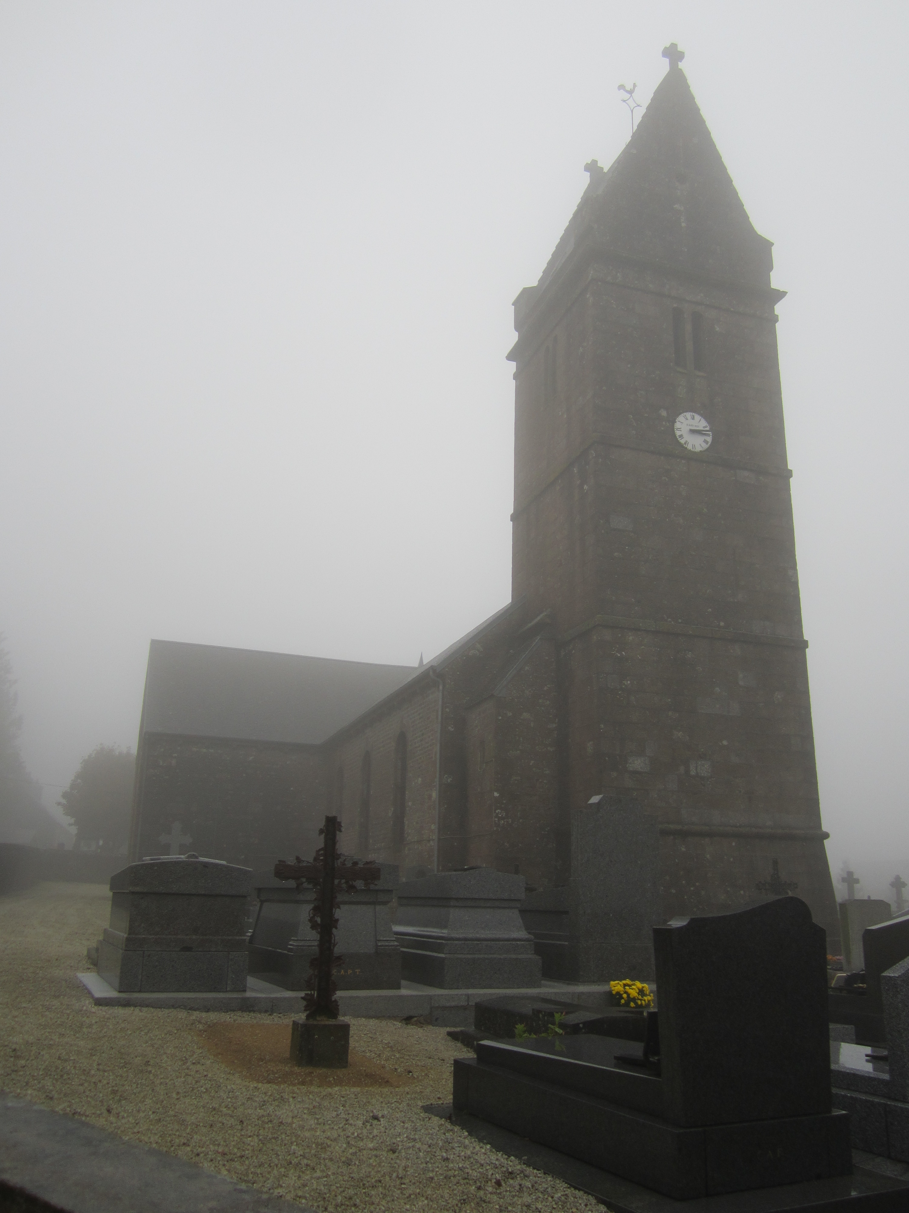 Saint-Michel-de-Montjoie, Manche